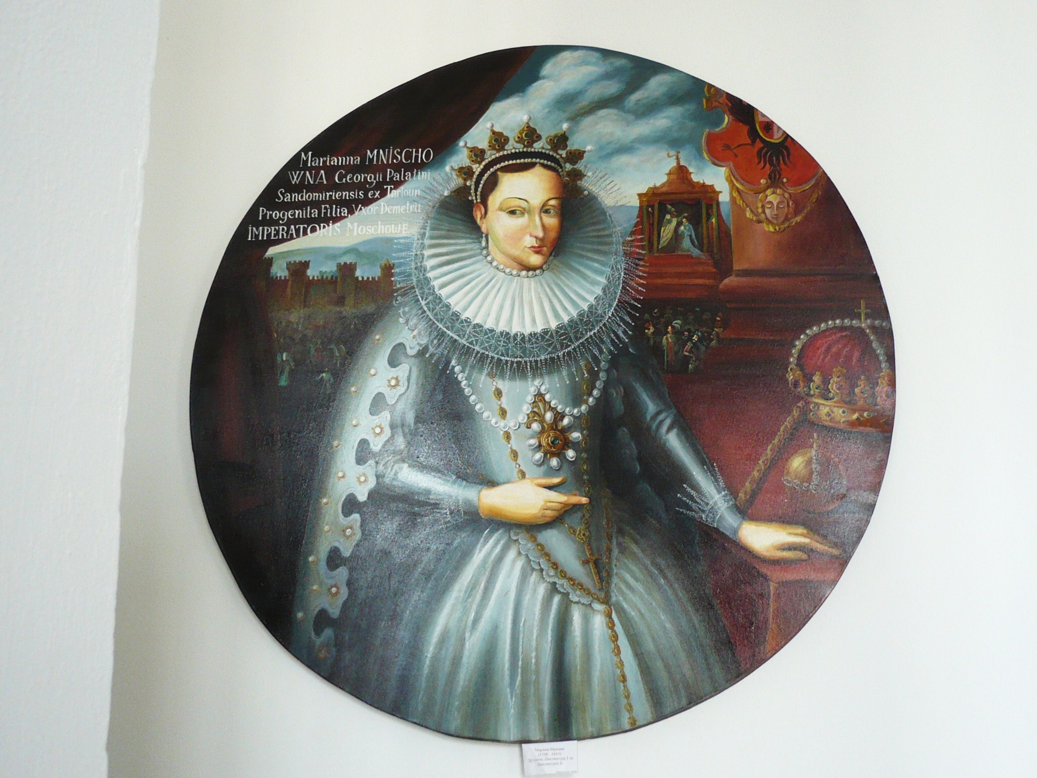 Wiśniowiec, obraz